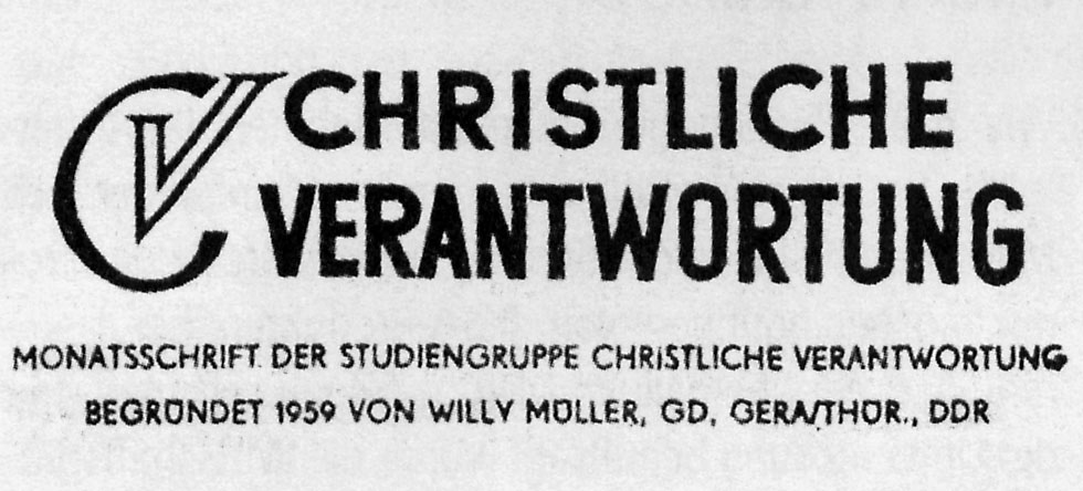 Logo der DDR-Zeitschrift Christliche Verantwortung